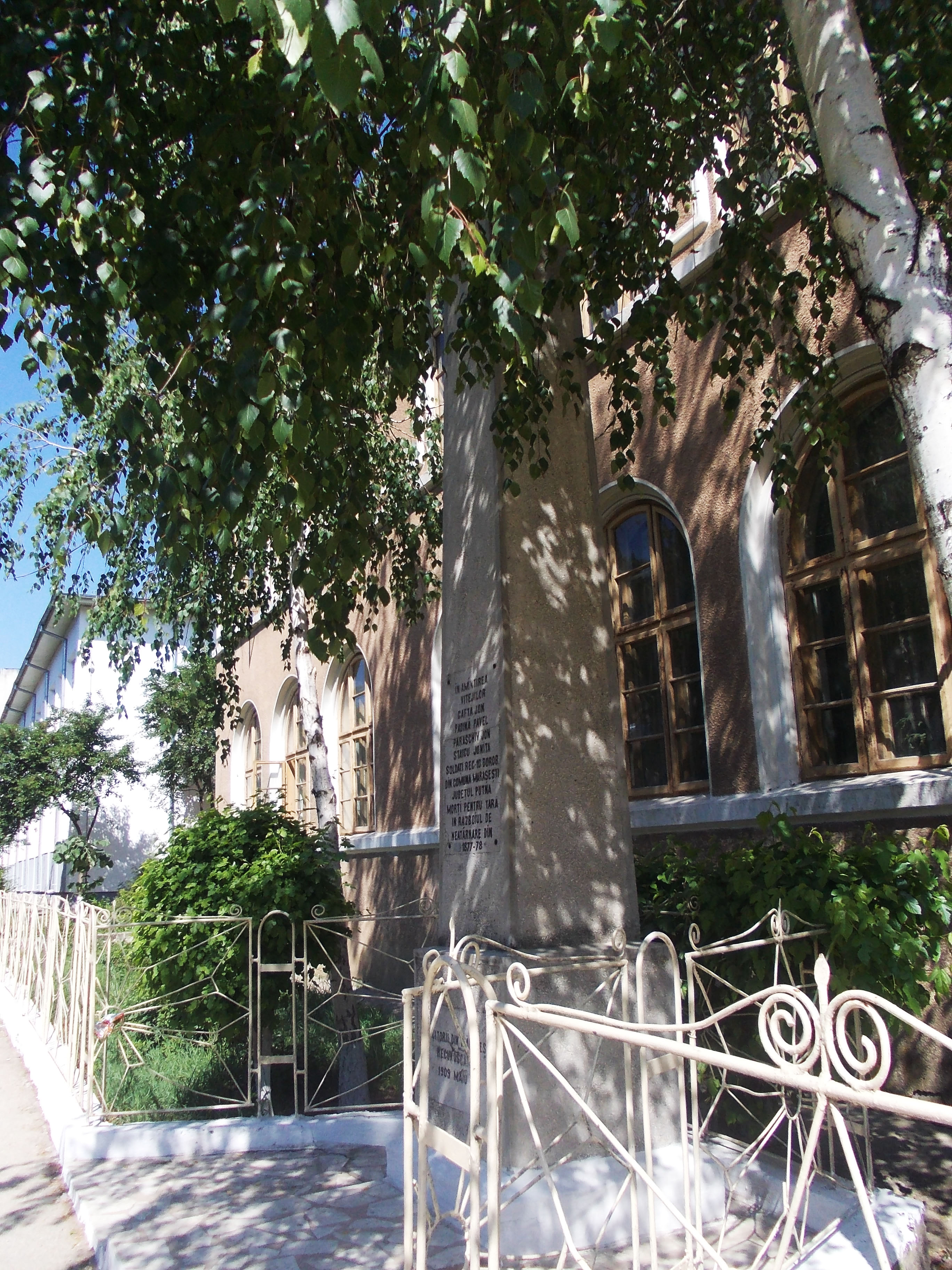 Str. Republicii 74 în incinta Liceului Mărășești